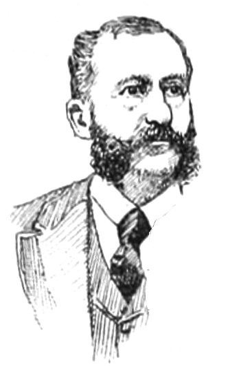 "La Nouvelle Chambre" : "De Kerjégu".